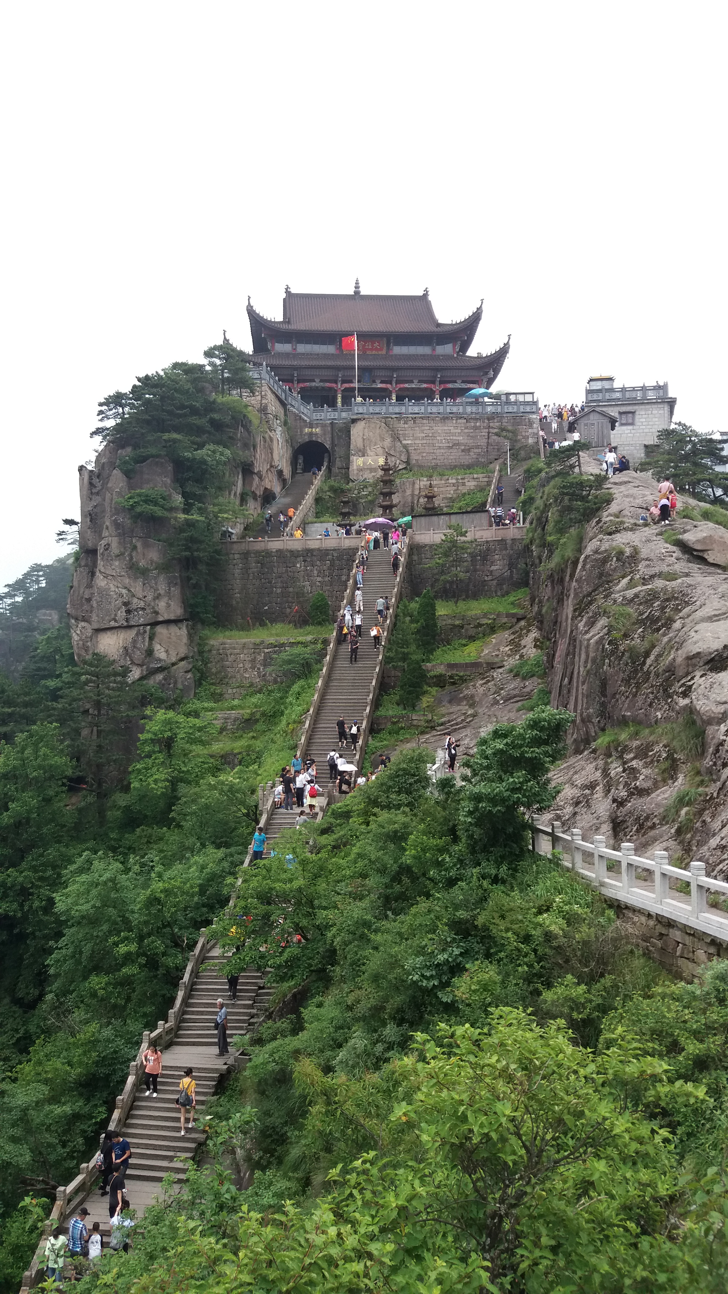 中国安徽池州九华山天台